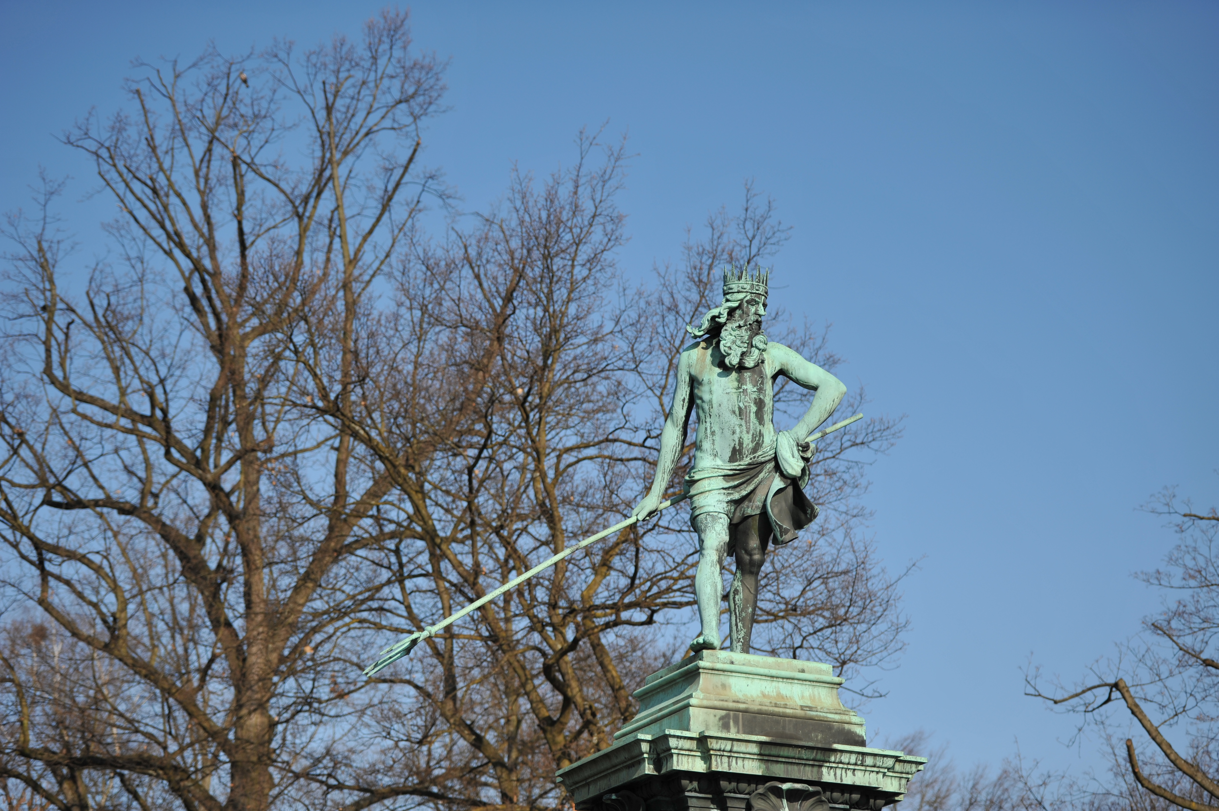 Neptunbrunnen Nürnberg, Neptun